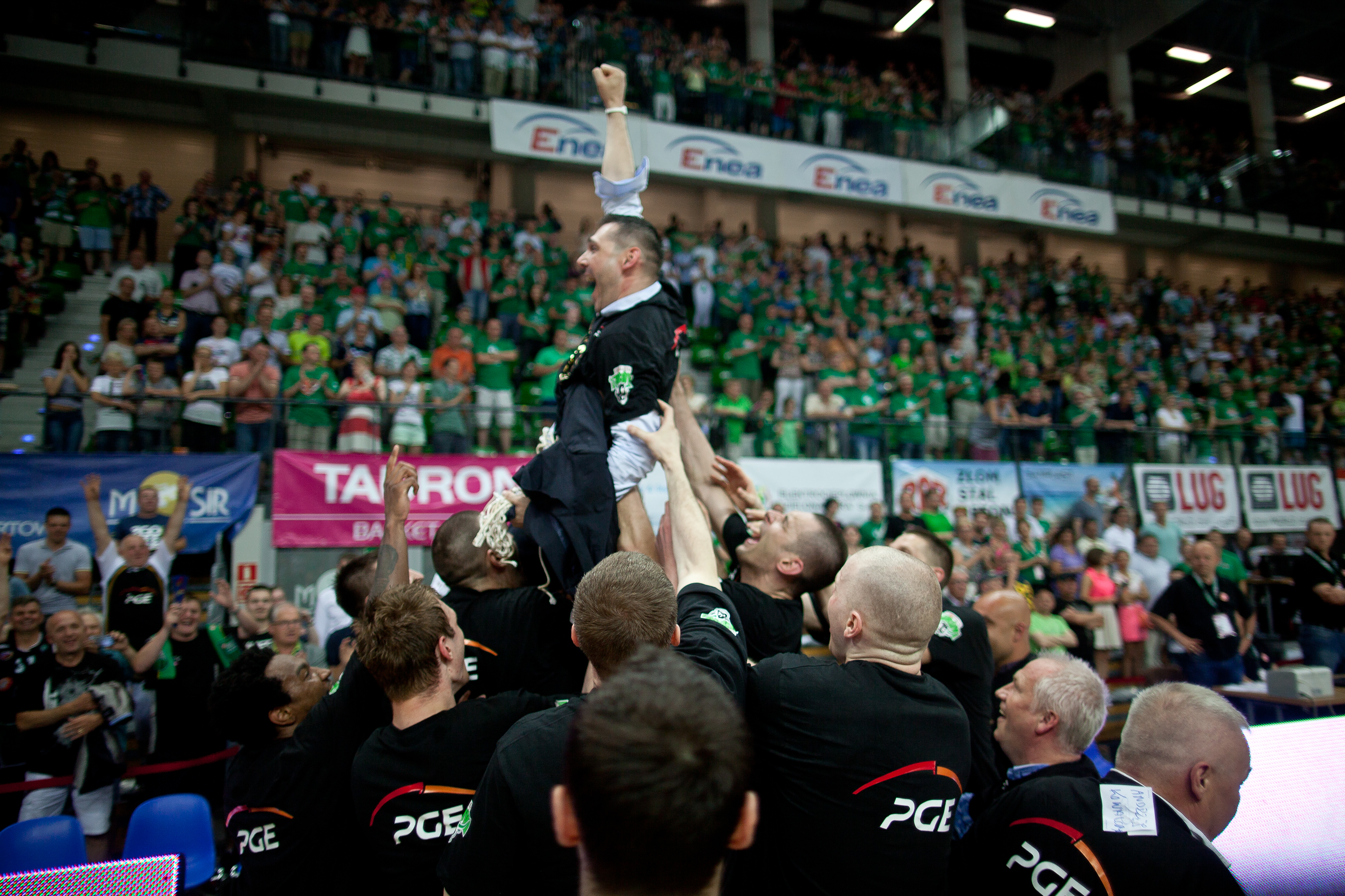 Miodrag Rajković na rękach koszykarzy PGE Turów Zgorzelec